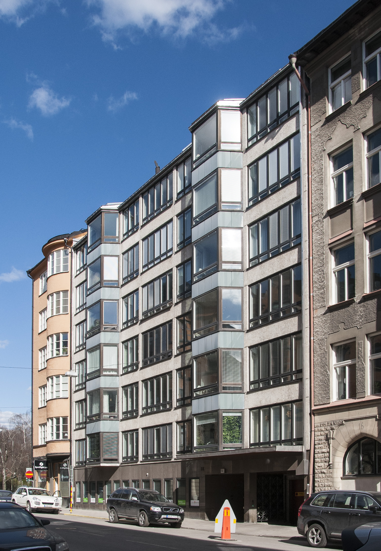 Tallen 30, Engelbrektsgatan 18 Stockholm Nybyggnadsår 1966 - 1968 Brf Albertina (Byggherre) Drott Gyllenberg (Arkitekt) Hifab (Byggherre) Sahgus AB (Byggmästare)